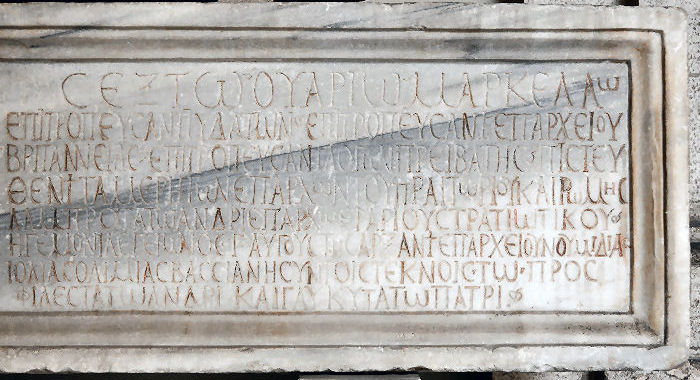 Латинський напис на труні Секста Варія Марцелла.